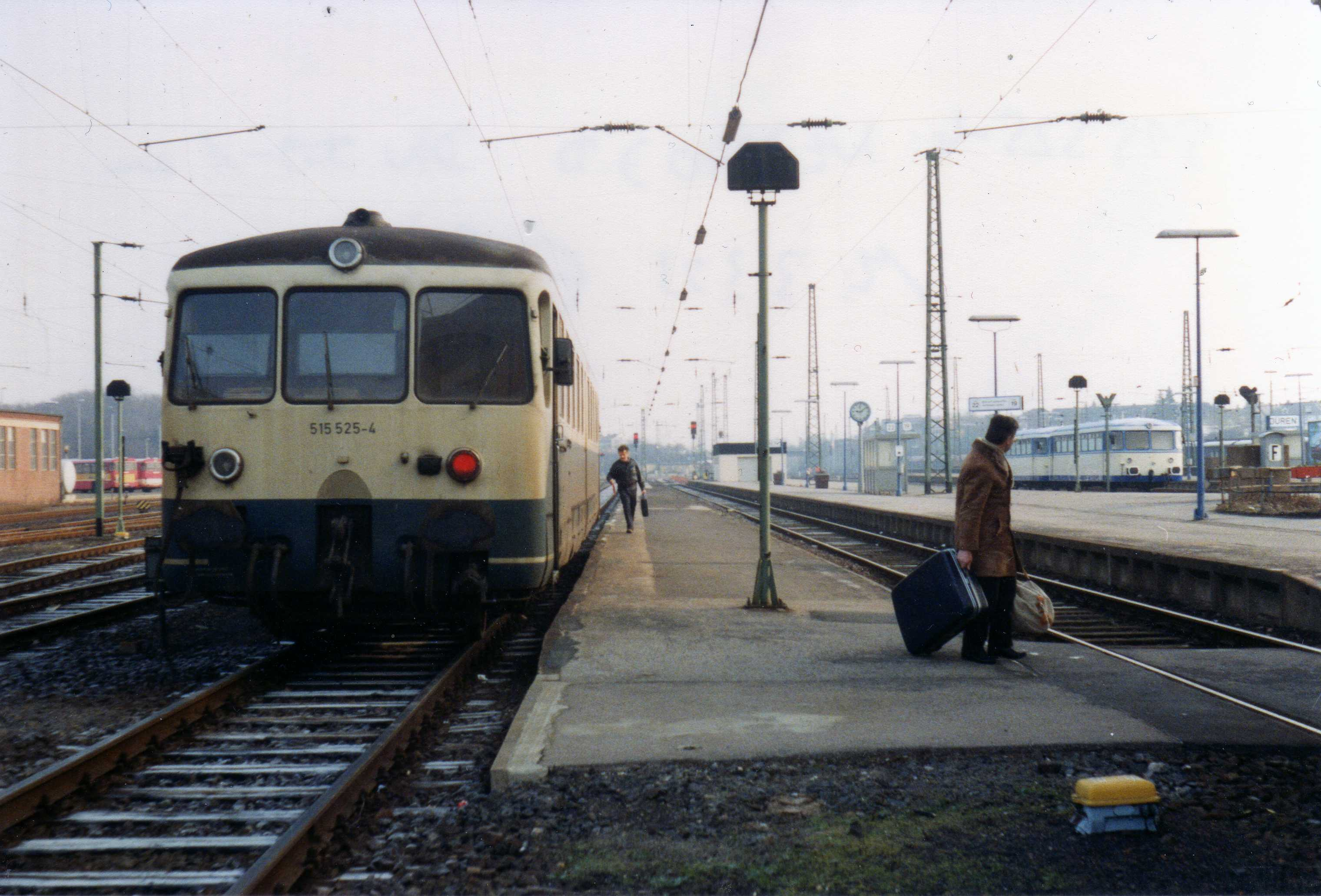 Etwa drei Monate vor der Übernahme der DB-Strecken Düren - Jülich und Düren - Heimbach durch die Dürener Kreisbahn trafen die ersten ex-DB-Schienenbusse in Düren ein, die der DKB als Übergangslösung bis zum Kauf moderner Fahrzeuge dienen sollten. Das Foto zeigt rechts auf Gleis 18 eine solche Schienenbus-Einheit, links auf Gleis 23 ist der mit sehr wenigen Fahrgästen besetzte Nt 7940 aus Jülich eingetroffen (planmäßig 9.09 Uhr, an jenem Mittwoch indes mit 1 Minute Verfrühung). Auf der Jülicher Strecke wird nun über 3 Stunden lang kein Zug verkehren.